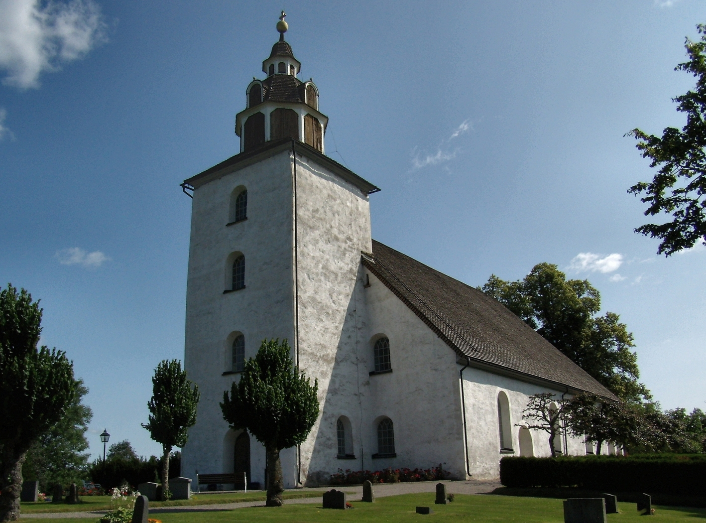 Odensvi kyrka, Småland